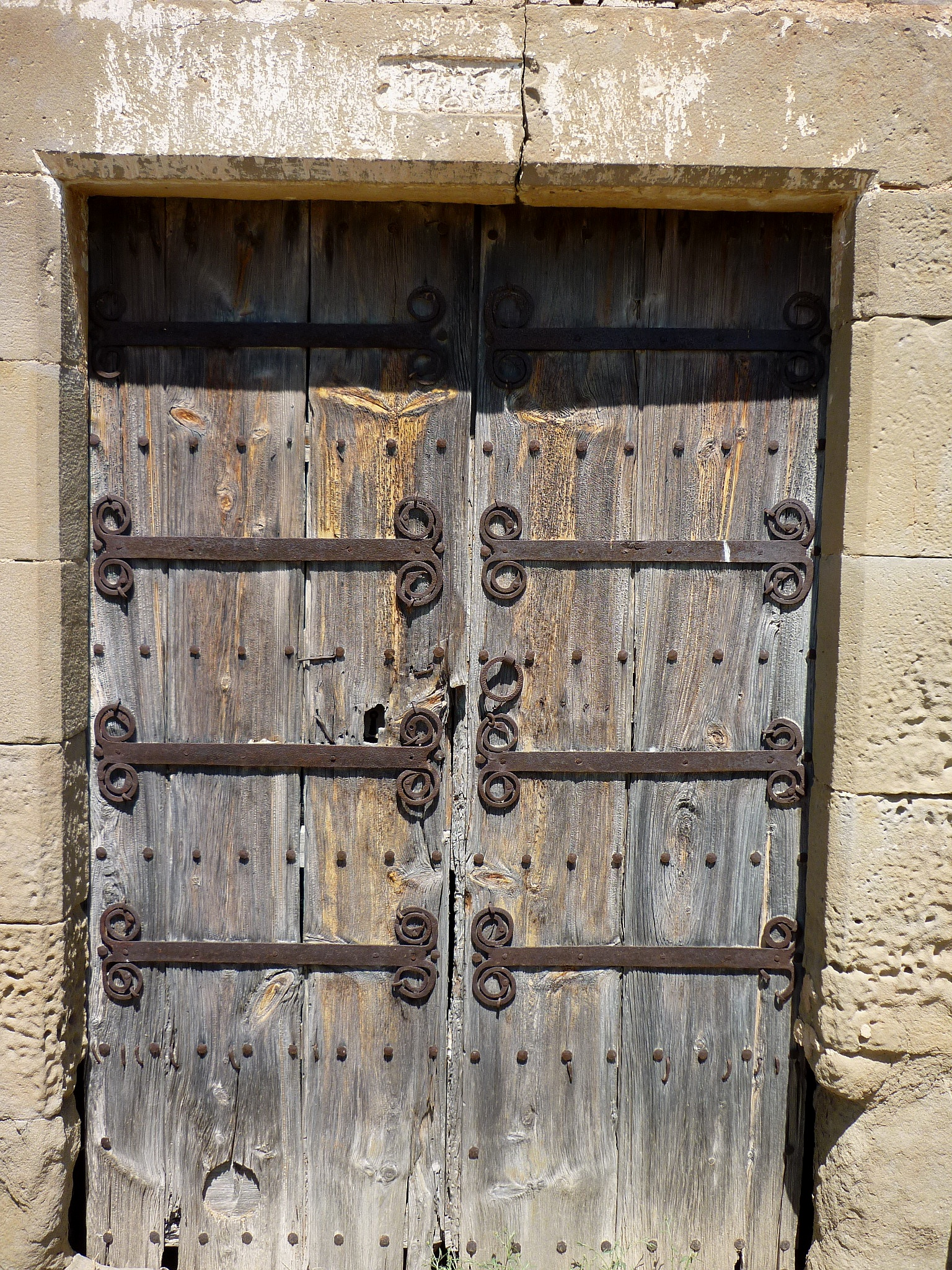 Església de Santa Maria de Sant Serni (Torà): Porta ferrada